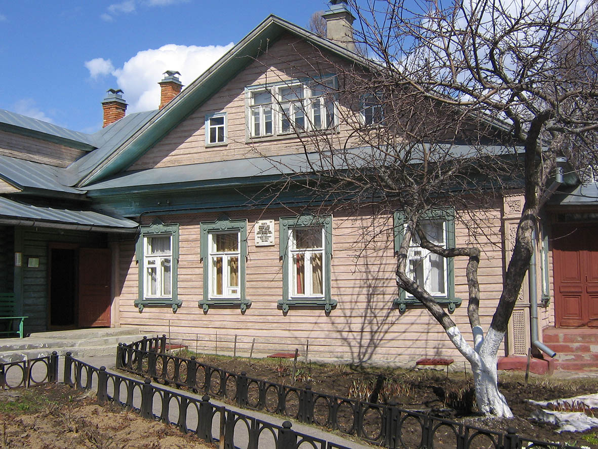 дом, в котором в 1904 г. родился летчик Чкалов В.П.; в доме - мемориальный музей В.П.Чкалова: улица Нагорная, 9; улица Чкалова, 5, Чкаловск, Чкаловский район, Нижегородская область